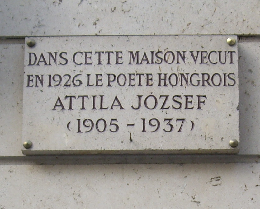 Plaque apposée au n° 4 de la rue du Vieux-Colombier, Paris 6e, où habita le poète Attila József (1905-1937) en 1926.